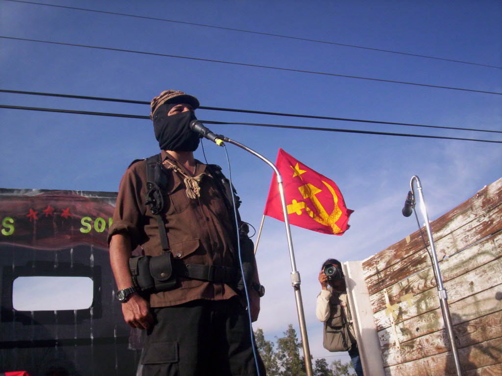 Subcomandante marcos en Salamanca el 12 de Marzo de 2006